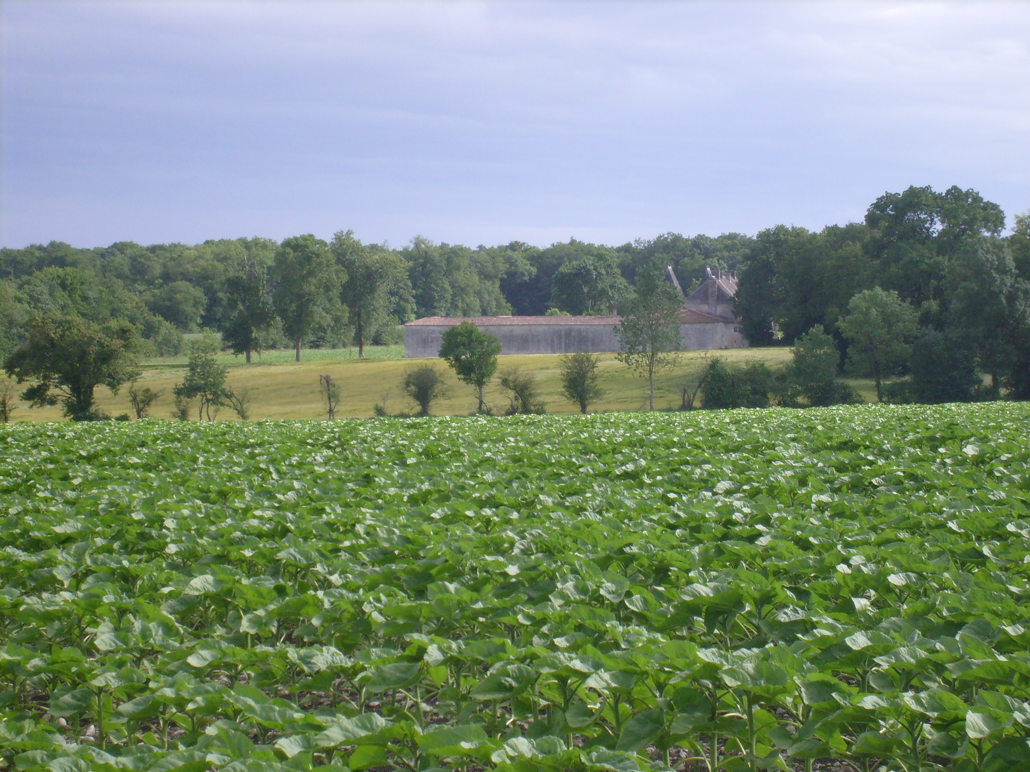 Vue sur le château de la Rigaudière à Médis (Charente-Maritime)